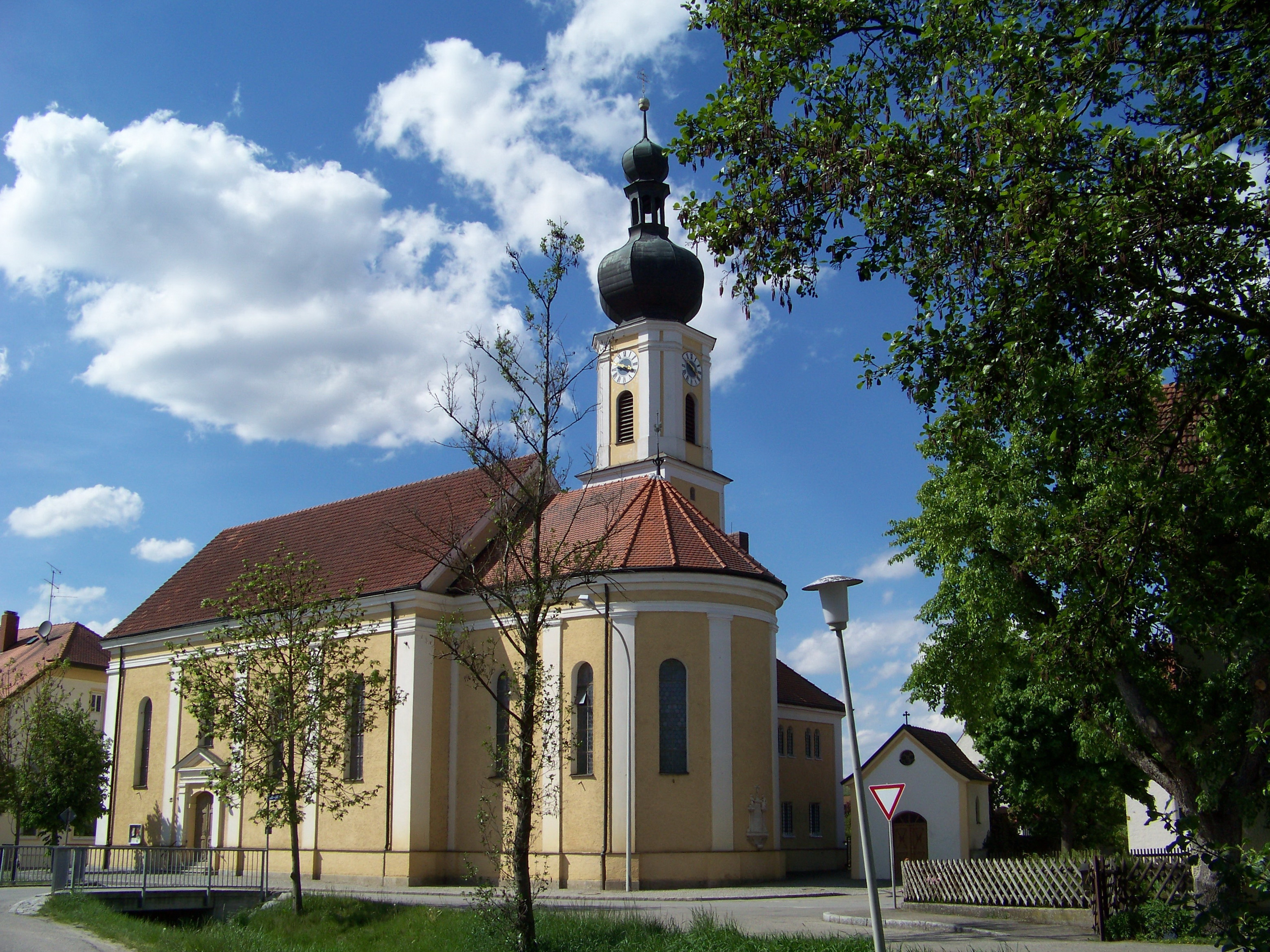 Pfarrkirche St. Pankratius Grafentraubach. Neubau 1896/97, mittelalterlicher Turm barock erhöht; mit Ausstattung; Seelenkapelle im Friedhof, erbaut 1854; mit Ausstattung. mit Zwiebelturm, im Kern mittelalterlich, Um- und Erweiterungsbauten im 16. Jahrhundert und im 1. Drittel 18. Jahrhundert.